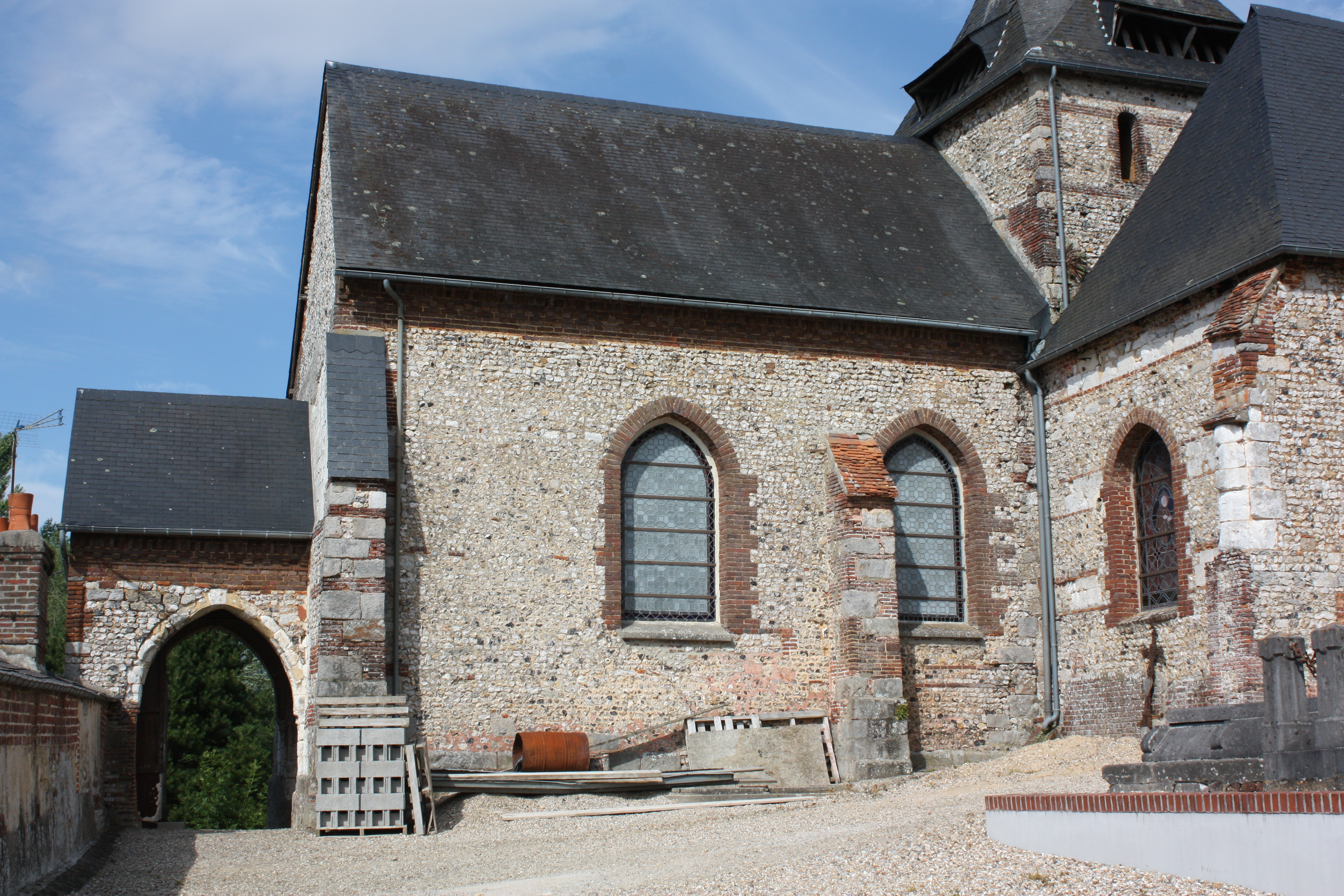 Wanchy-Capval - Eglise Saint-Pierre, vue du Sud